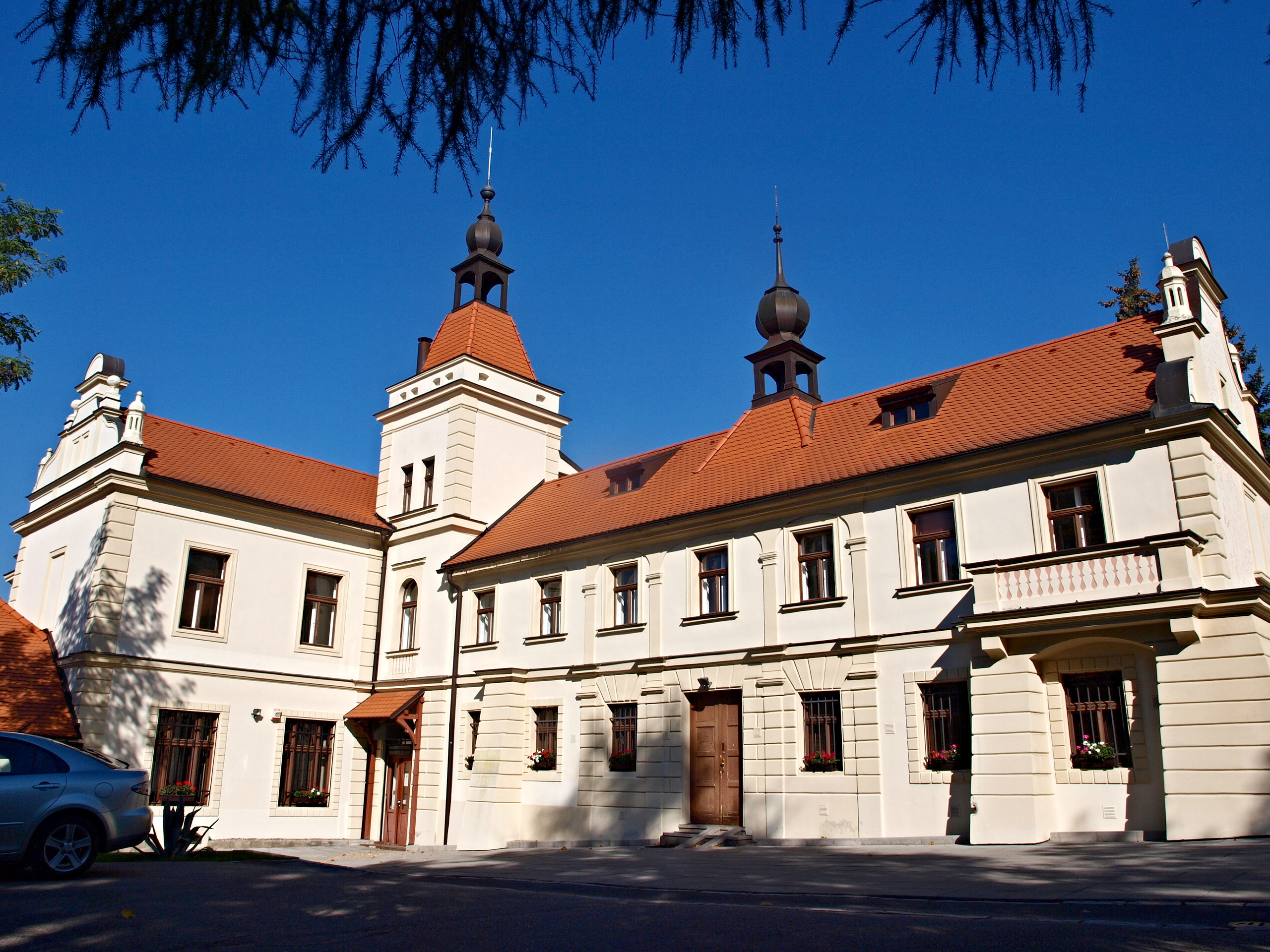 Praha-Braník, Zámeček Na Křížku